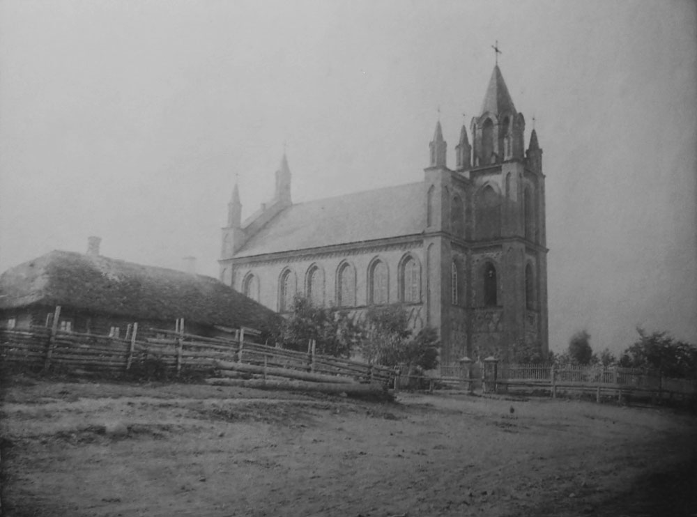 Беларуская (тарашкевіца): Жупраны (Župrany), пляц Рынак (plac Rynak). Касьцёл